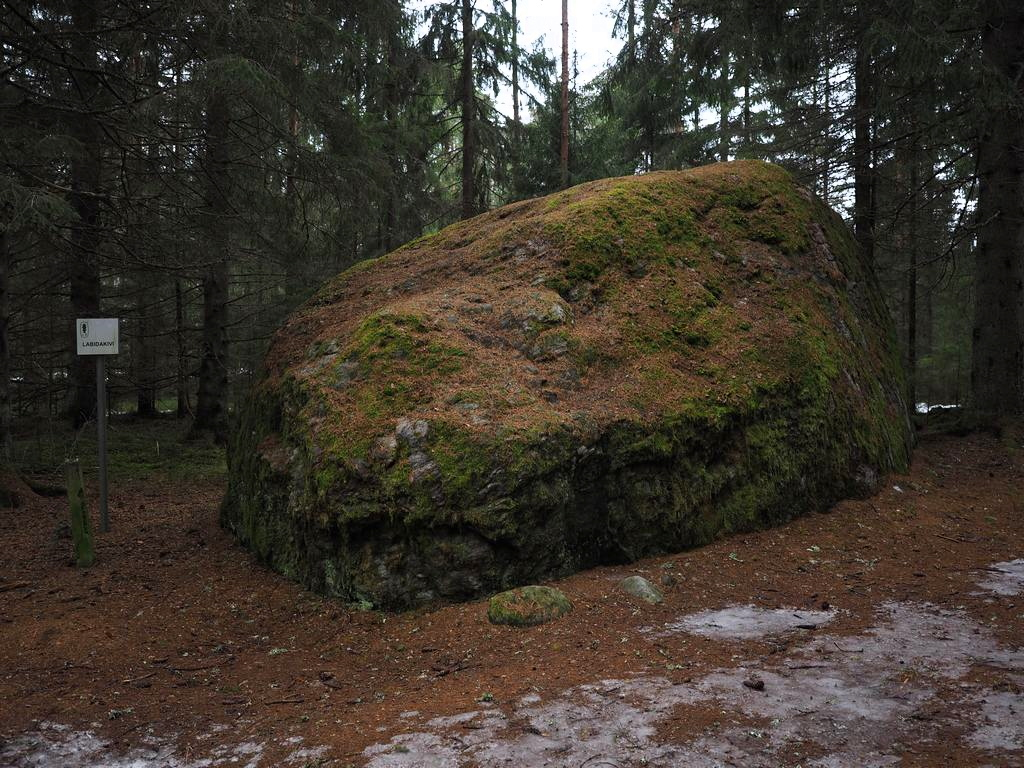 Labidakivi hiidrahn, Viljandi maakonnas, Suure-Jaani vallas.